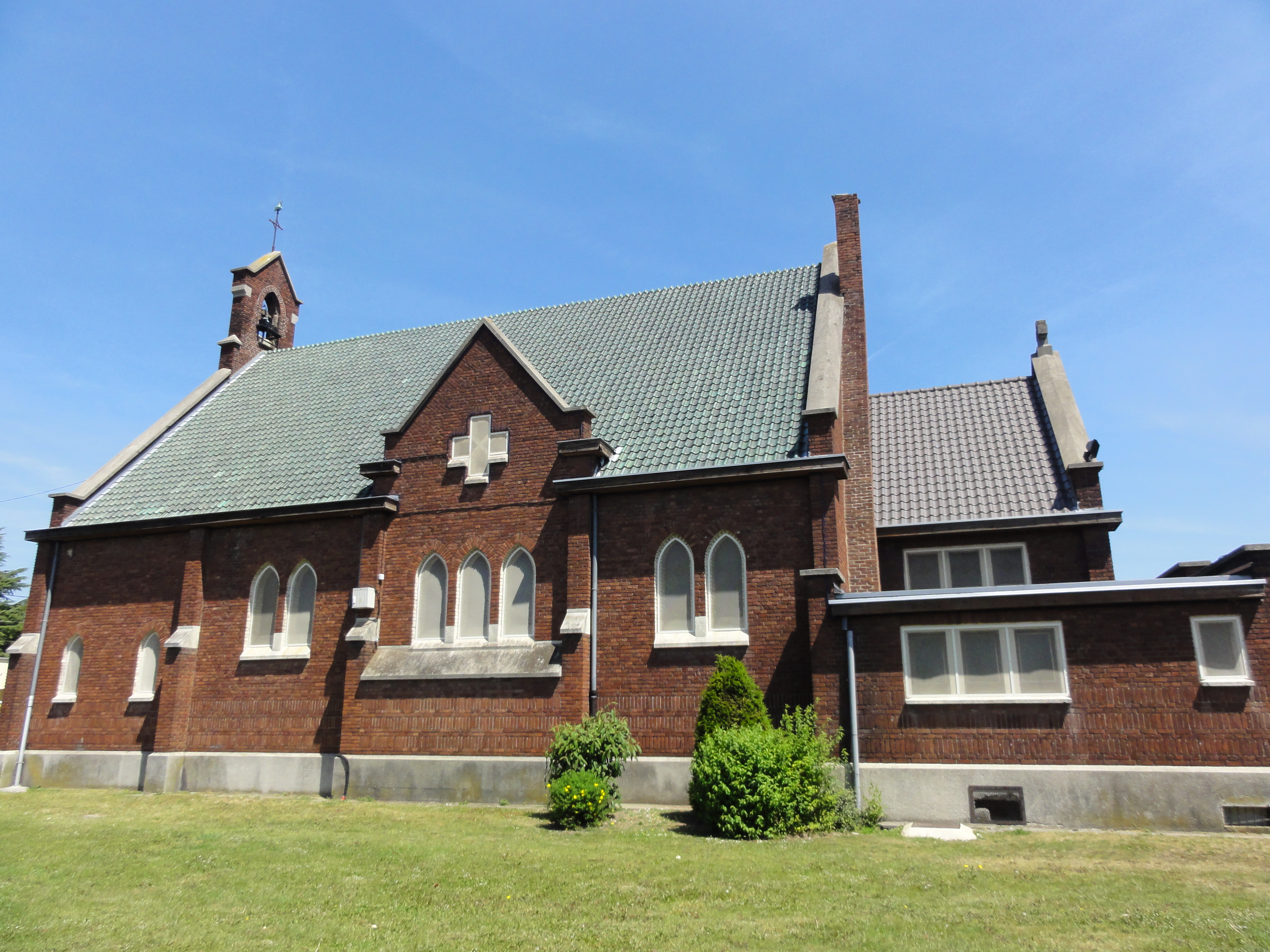 Église du Sacré-Cœur des cités de la fosse n° 21 - 22 de la Compagnie des mines de Courrières dans le bassin minier du Nord-Pas-de-Calais, Harnes, Pas-de-Calais, Nord-Pas-de-Calais, France.